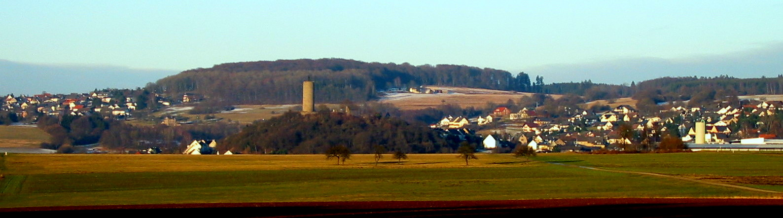 Der Ort Hartenfels mitsamt dem Burgberg